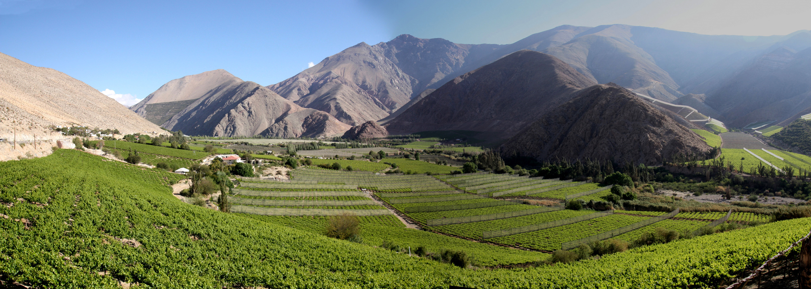 Panorámica de Pisco Elqui, Chile (3)